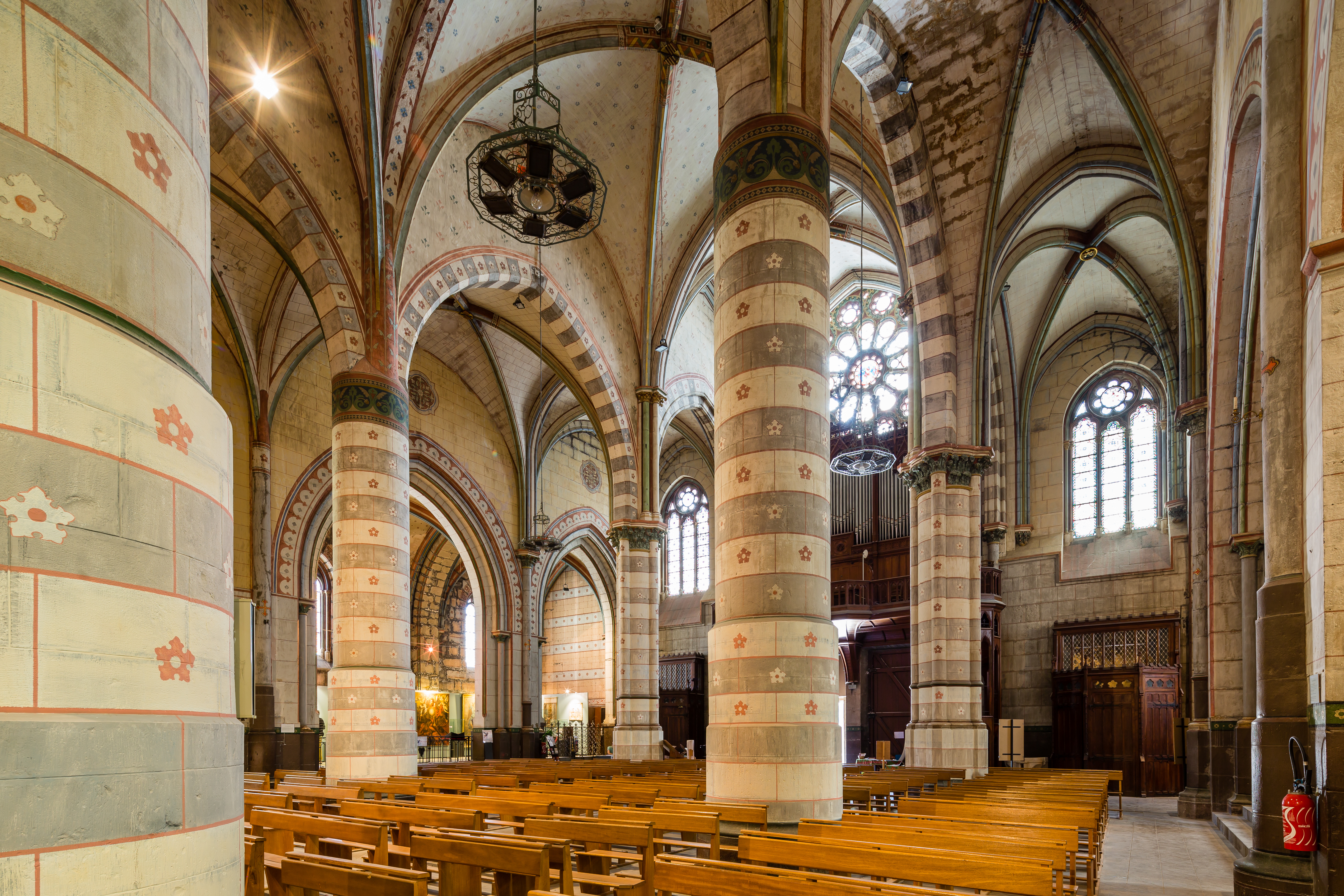 Nef de la cathédrale Saint-Jérôme de Digne-les-Bains (France).